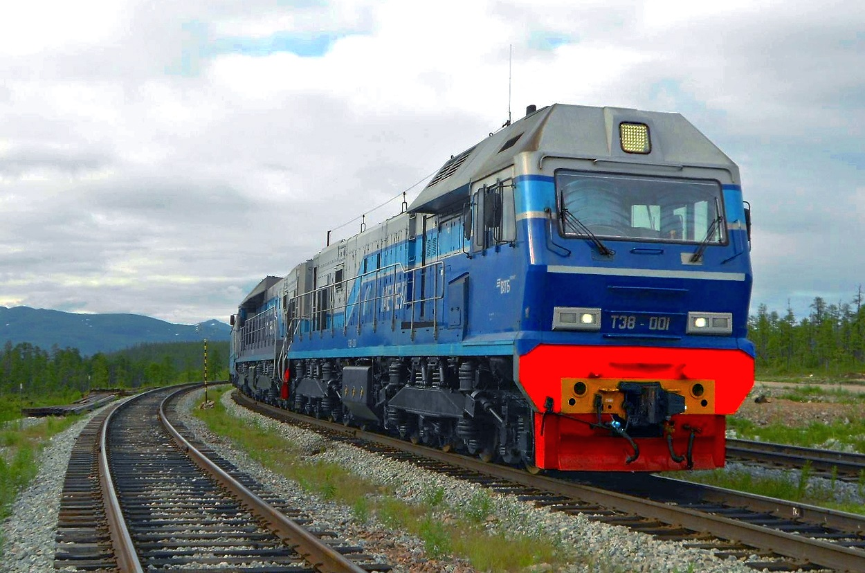 Тепловозы ТЭ8-001 и 002 с грузовым поездом. Линия Улак-Эльга